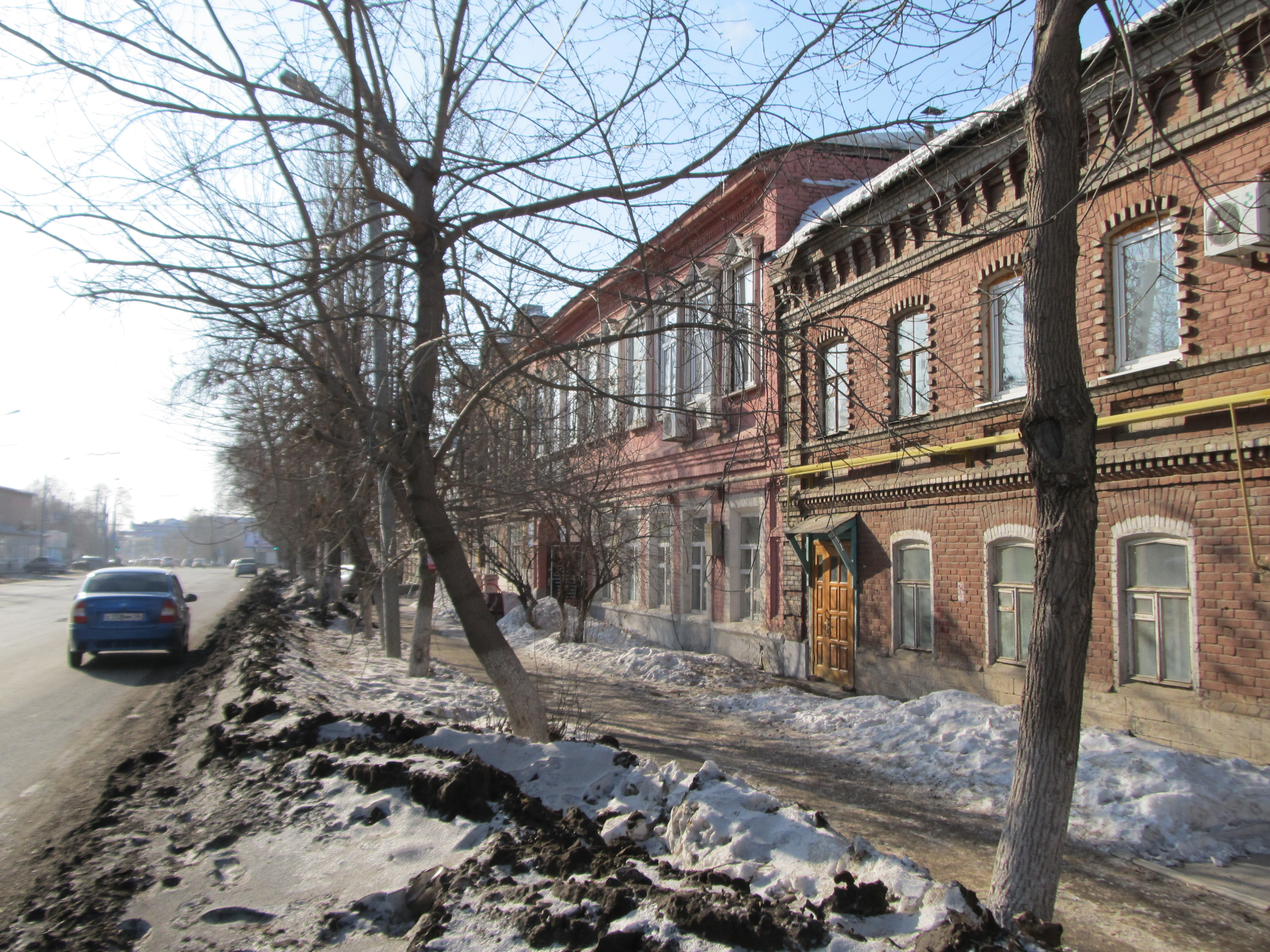 Музей-квартира Юрия и Валентины Гагариных в г.Оренбурге на ул. Чичерина